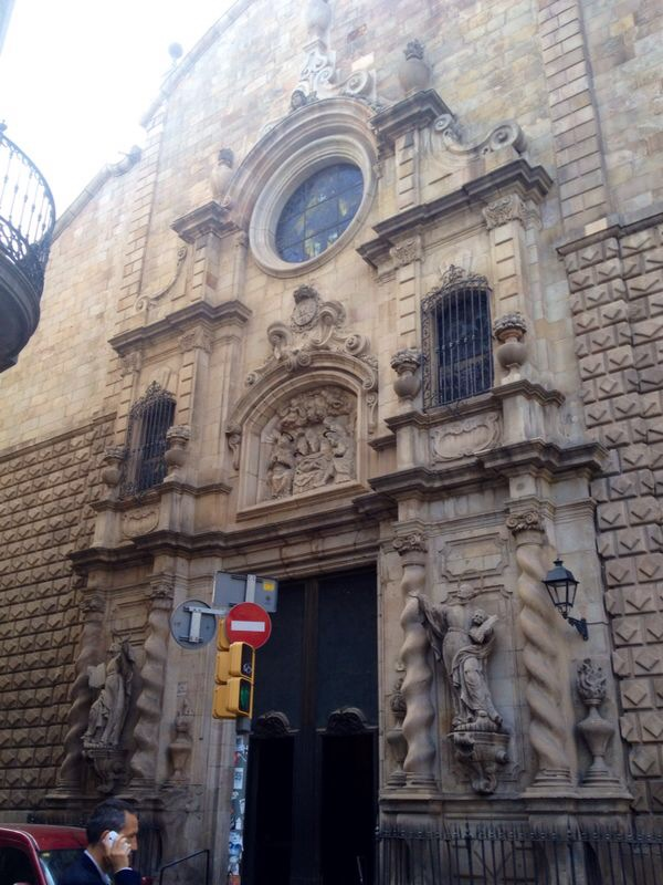 Façana de l'església de Betlem de Barcelona